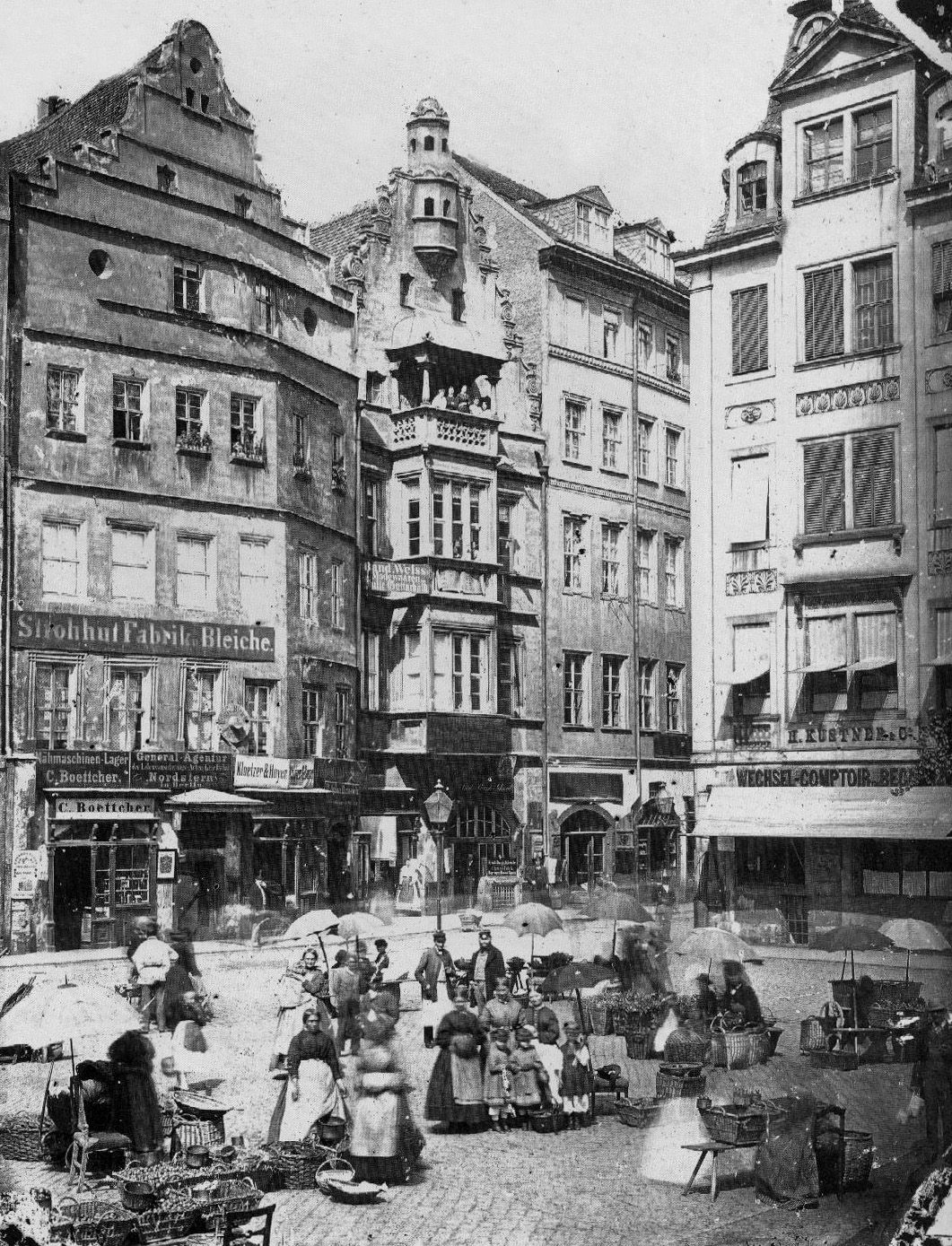 Leipzig Markt Nr. 8 und Hainstraße Nr. 1 / Kleine Fleischergasse Nr. 2, Haus zur Goldenen Schlange / Barthels Hof. Barthels Hof vor der Umgestaltung vom Markt aus gesehen. Die Umgestaltung mit Verlegung des Renaisanceerkers des Hauses "Zur goldenen Schlange" zur Hofseite erfolgte 1870/71. Rechts neben Barthels Hof vier Fensterachsen des Mitte des 19. Jahrhunderts um zwei Etagen aufgestockten Webers Hof.